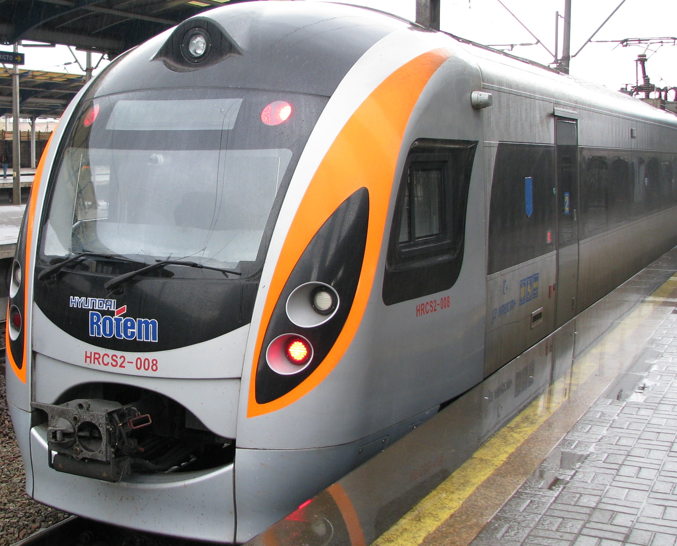 Скоростной электропоезд HRCS2-008 Интерсити+ на станции Дарница